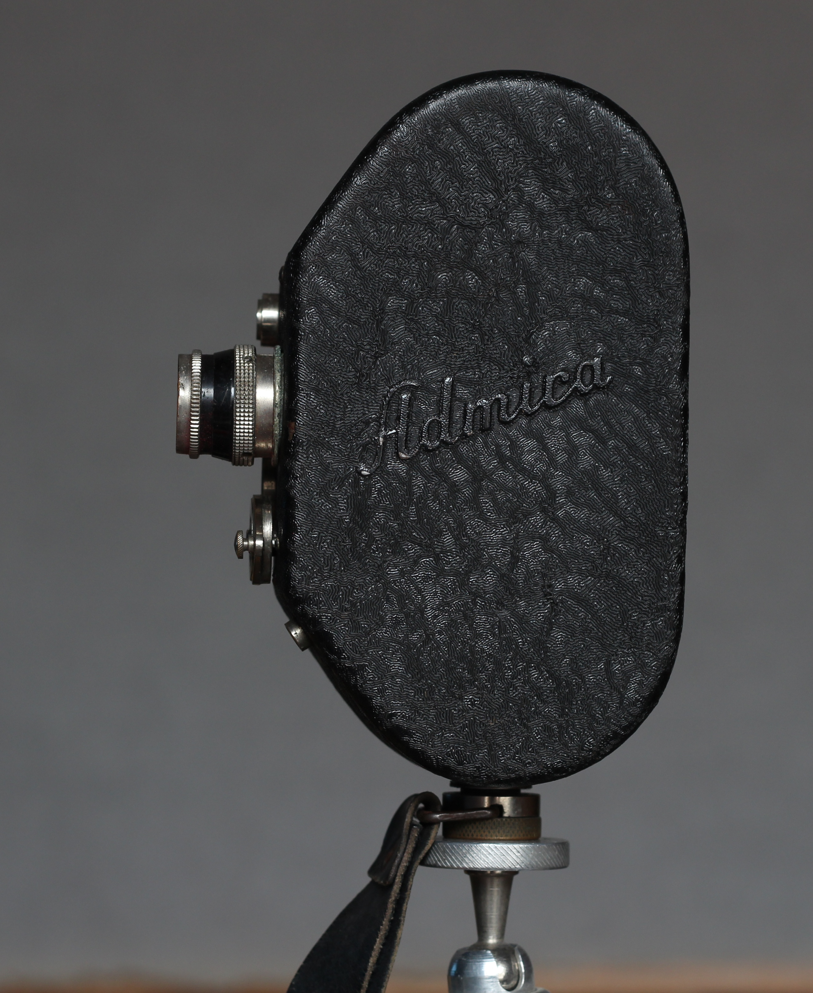 Admira 8 zvaná ledvinka, výroba Jindřich Suchánek Brno, boční pohled s názvem kamery